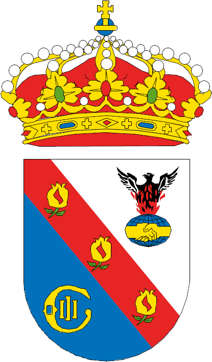 Escudo de Arenas del Rey, en Granada (España)